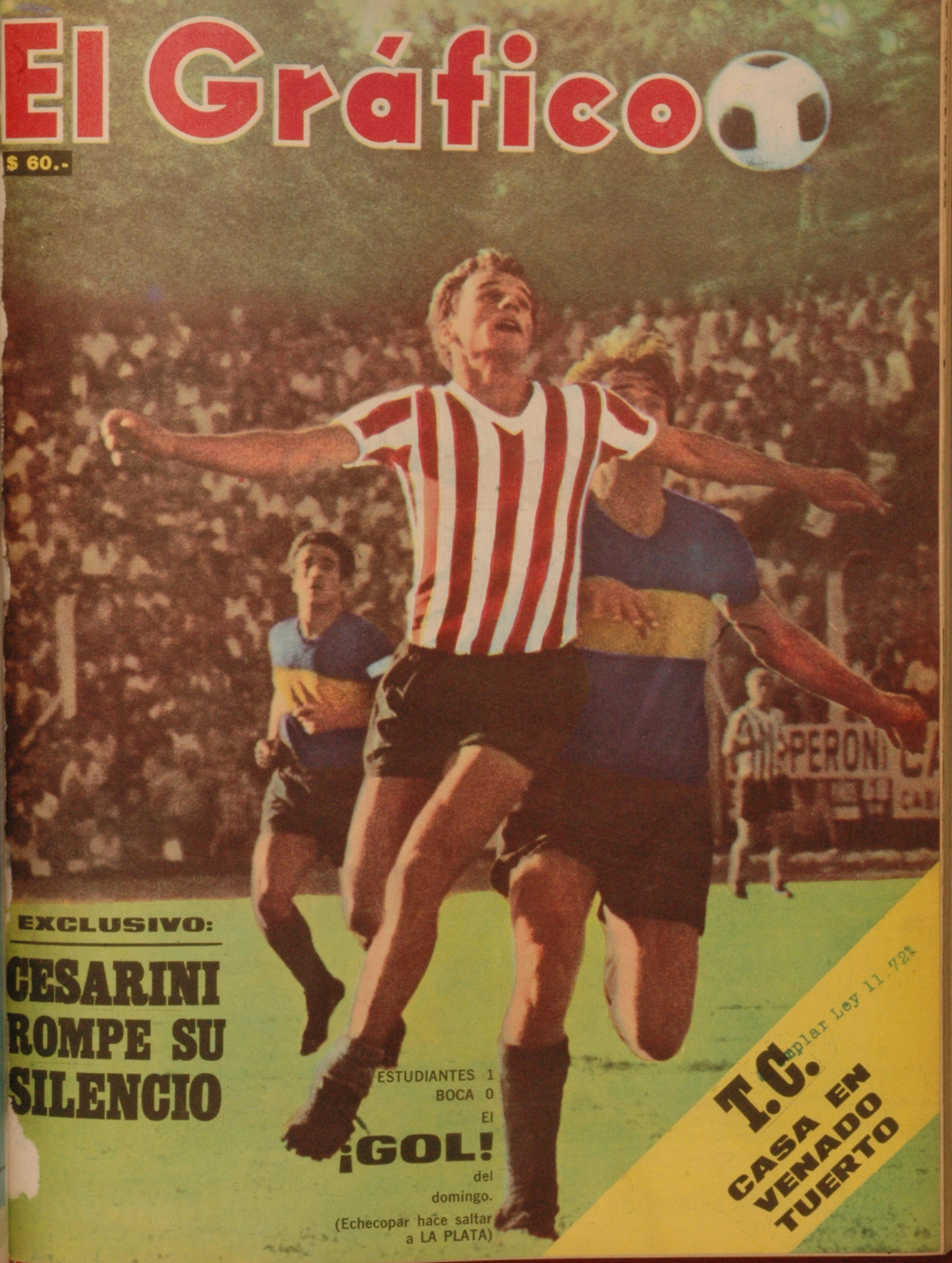 El Grafico del 28 de Marzo de 1967. Edicion 2477